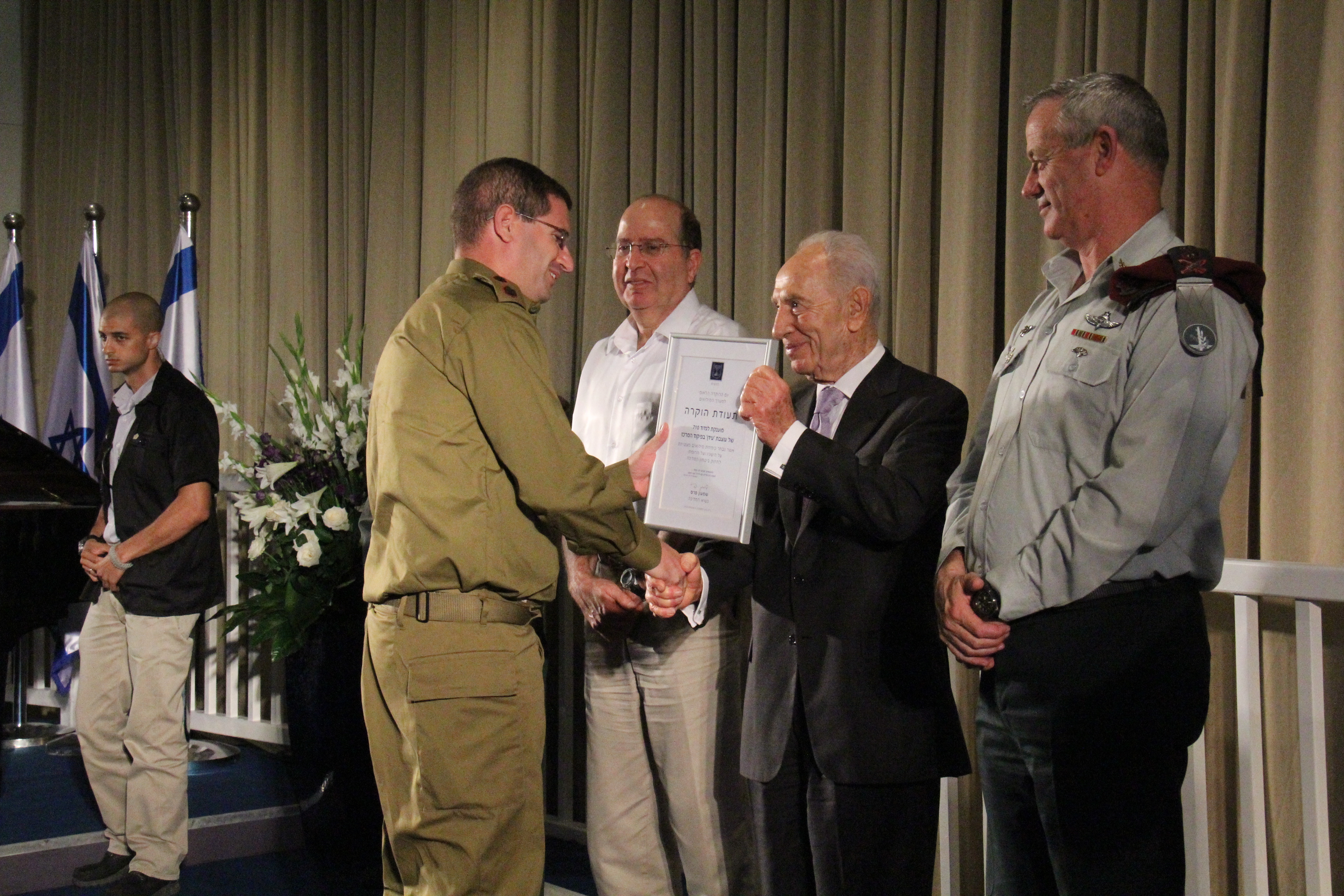 שמעון פרס מעניק למג"ד 710,יונתן גולדפוס, את תעודת ההצטיינות לשנת 2013